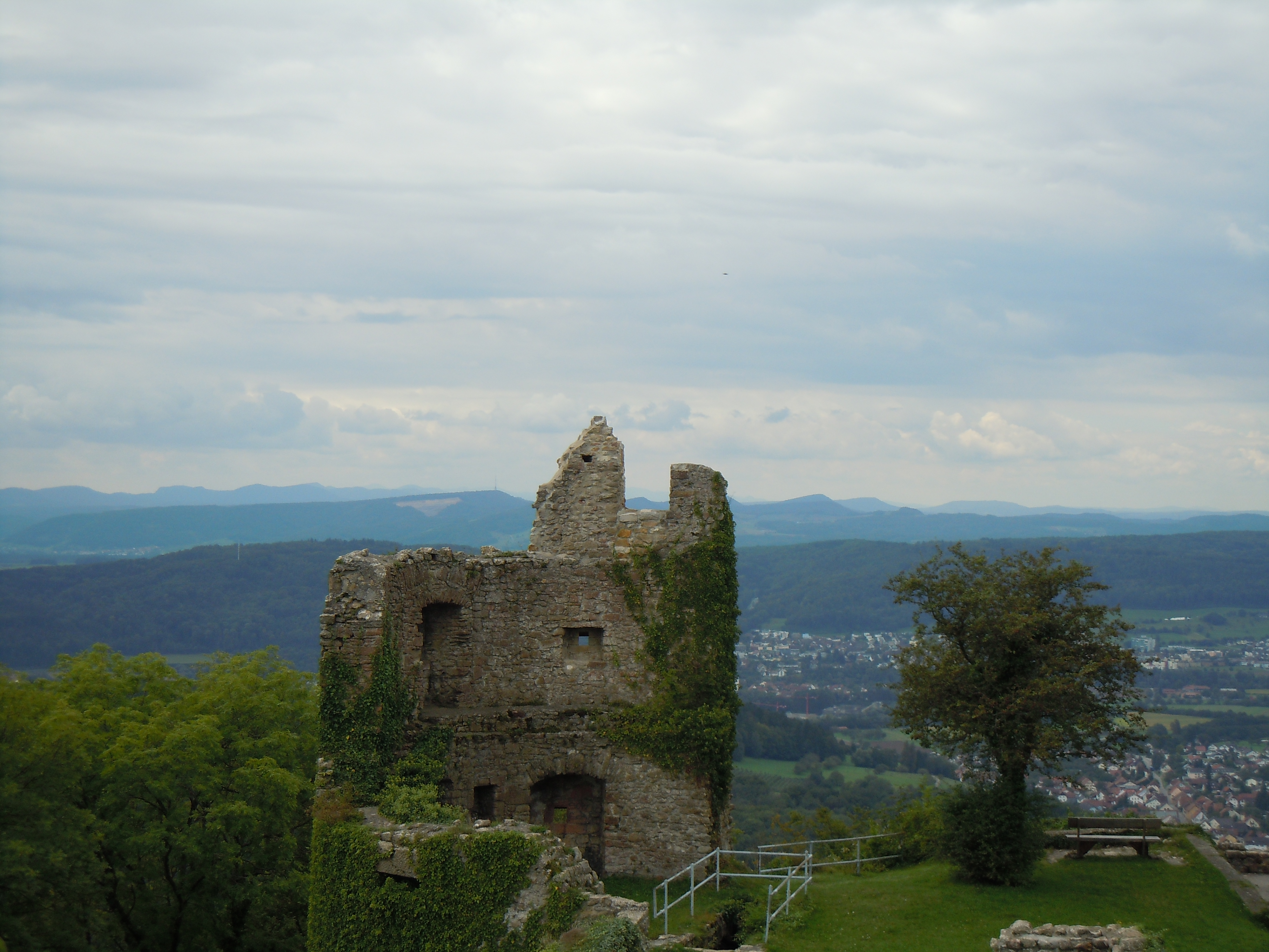 Küssaburg, Baden-Württemberg, Waldshut, Deutschland